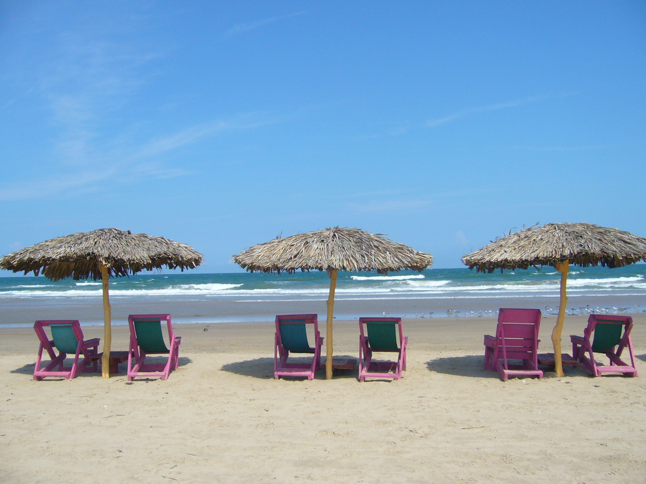 Playa Miramar en Ciudad Madero, Tamaulipas, México.